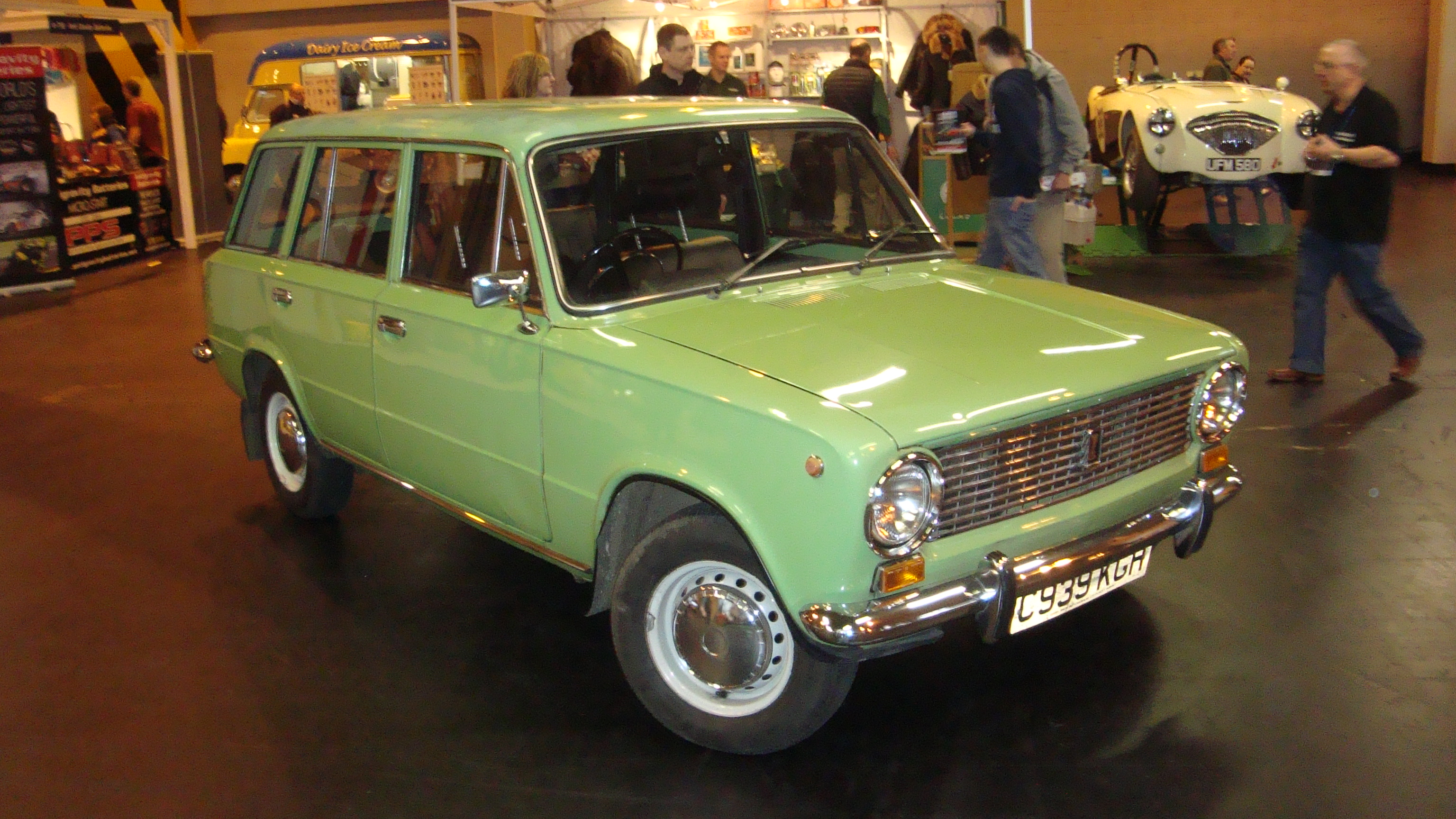 1986 Lada 1200 Estate